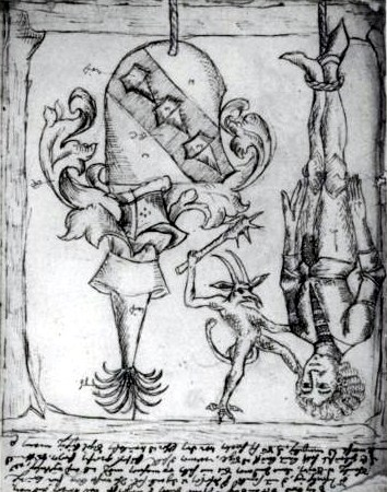 Schandbild (image infamante), Saydro et Isaac Straubinger contre Hans Judmann, 1490, Allemagne. Copie du XVIIe siècle dans les Bayerisches Hauptstaatsarchiv, Munich. p. 47.